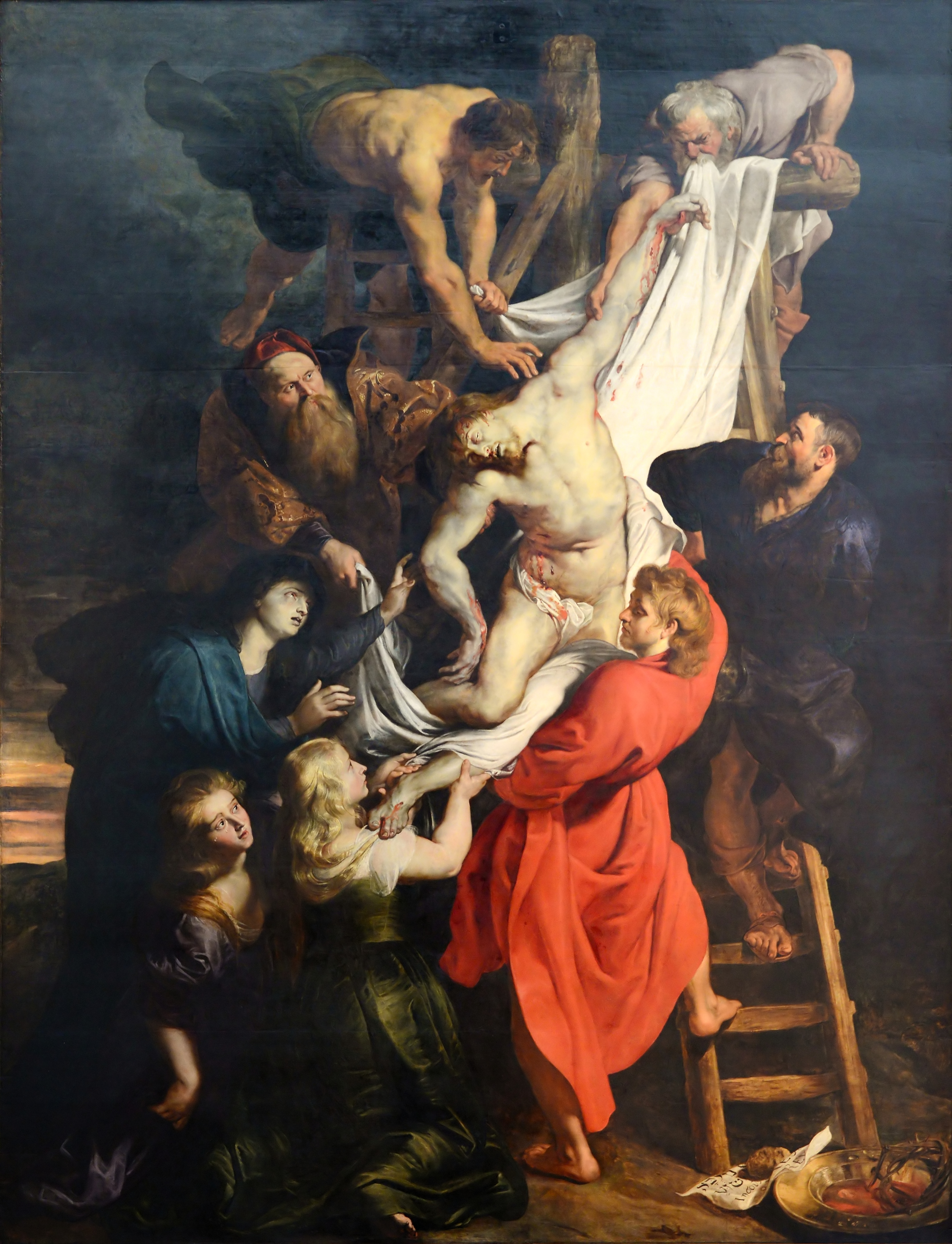 centre panel